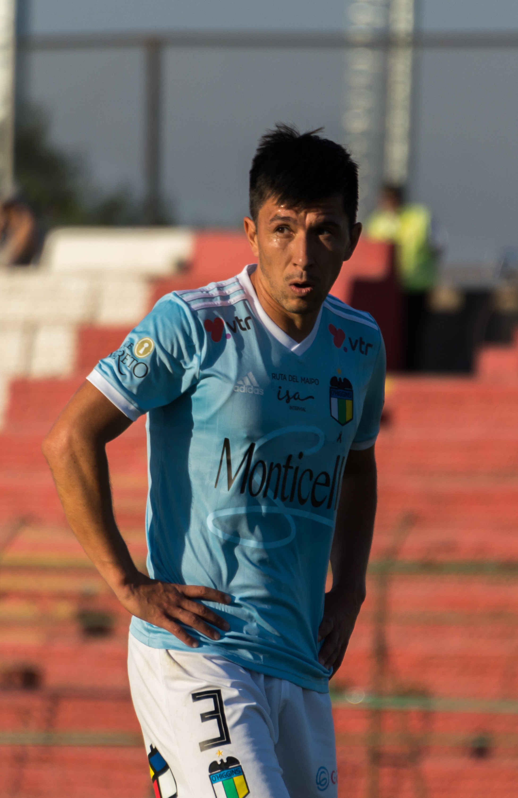 Albert Acevedo, Palestino v O'Higgins, Estadio Municipal de La Cisterna, La Cisterna, Santiago, Chile.